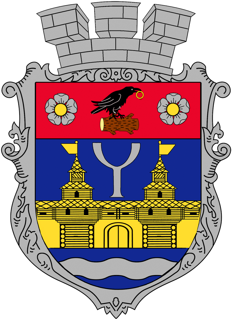 Герб Чоповицької селищної громади